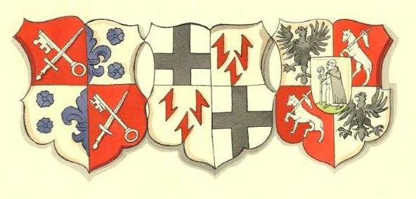 Vana-Liivimaa valitsejate vapid aastal 1556: Tartu piiskop Hermann Wesel, ordumeister Heinrich von Galen, Saaremaa ja Kuramaa piiskop Johannes von Münchhausen.